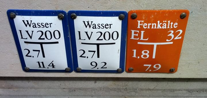 Hinweisschild für Fernkälte in der Dresdner Innenstadt